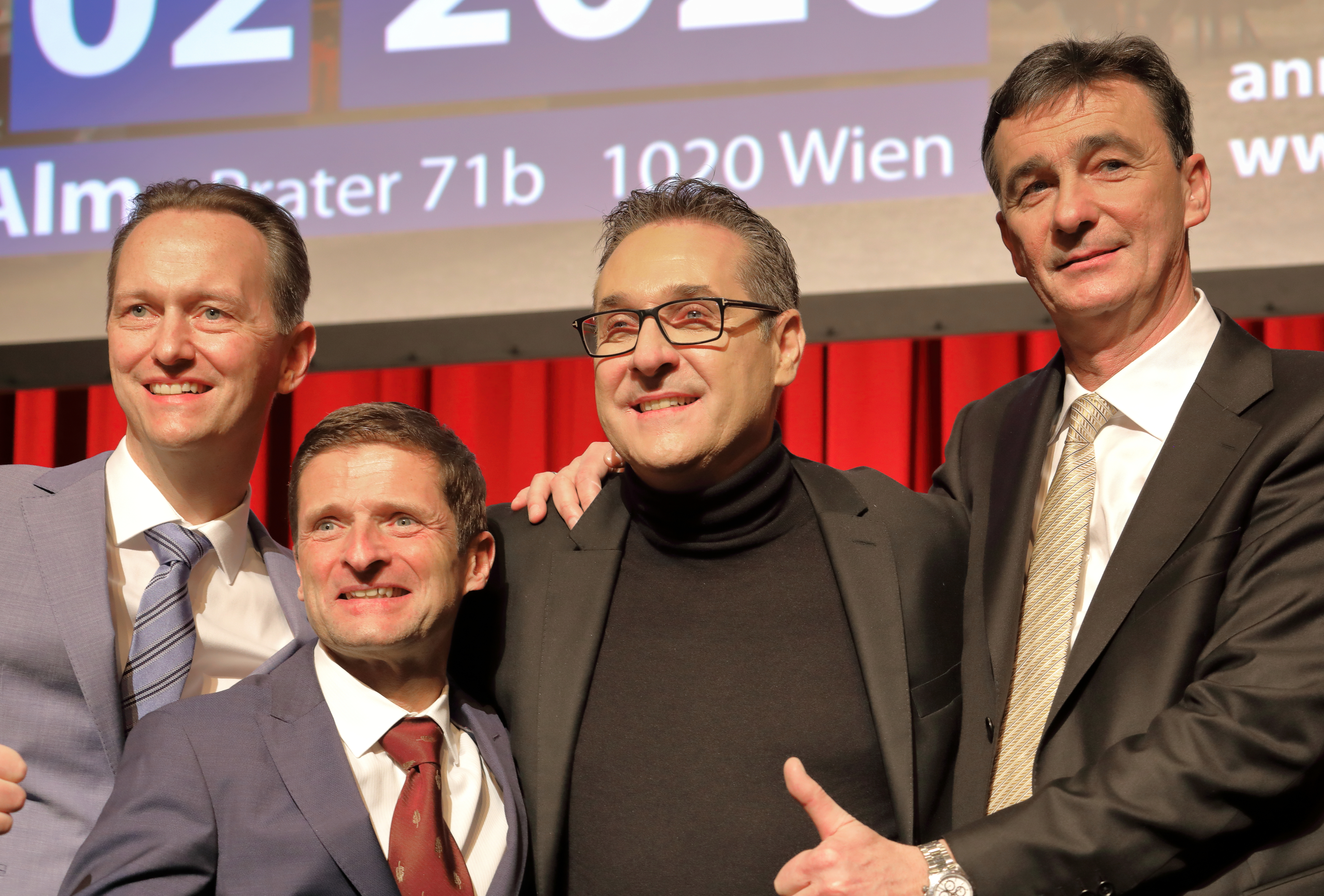 Gruppenbild mit den DAÖ-Gründern Karl Baron (rechts), Dietrich Kops, Klaus Handler (links) sowie dem „Gastredner“ Heinz-Christian Strache beim ersten DAÖ-Neujahrstreffen in den Sofiensälen im 3. Wiener Gemeindebezirk Landstraße.